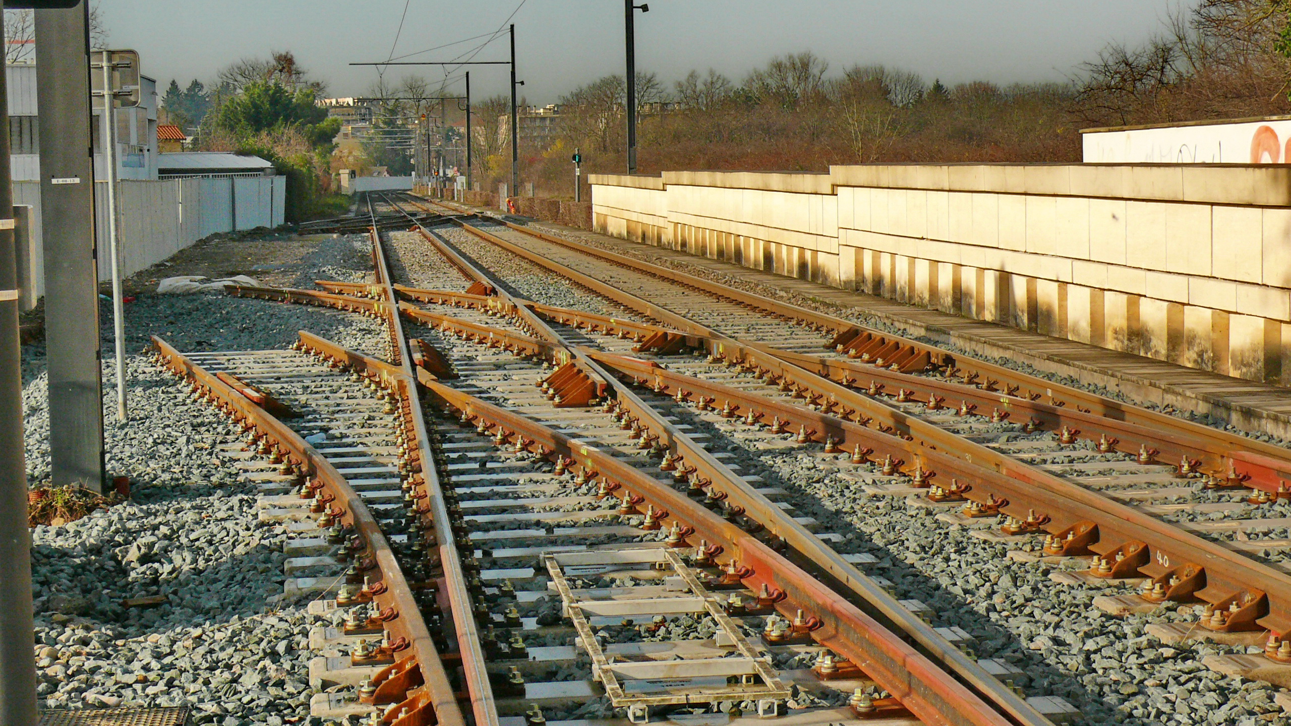 T3 - Vue des deux débranchements en attente du futur raccordement du Stade des Lumières à Décines en décembre 2012